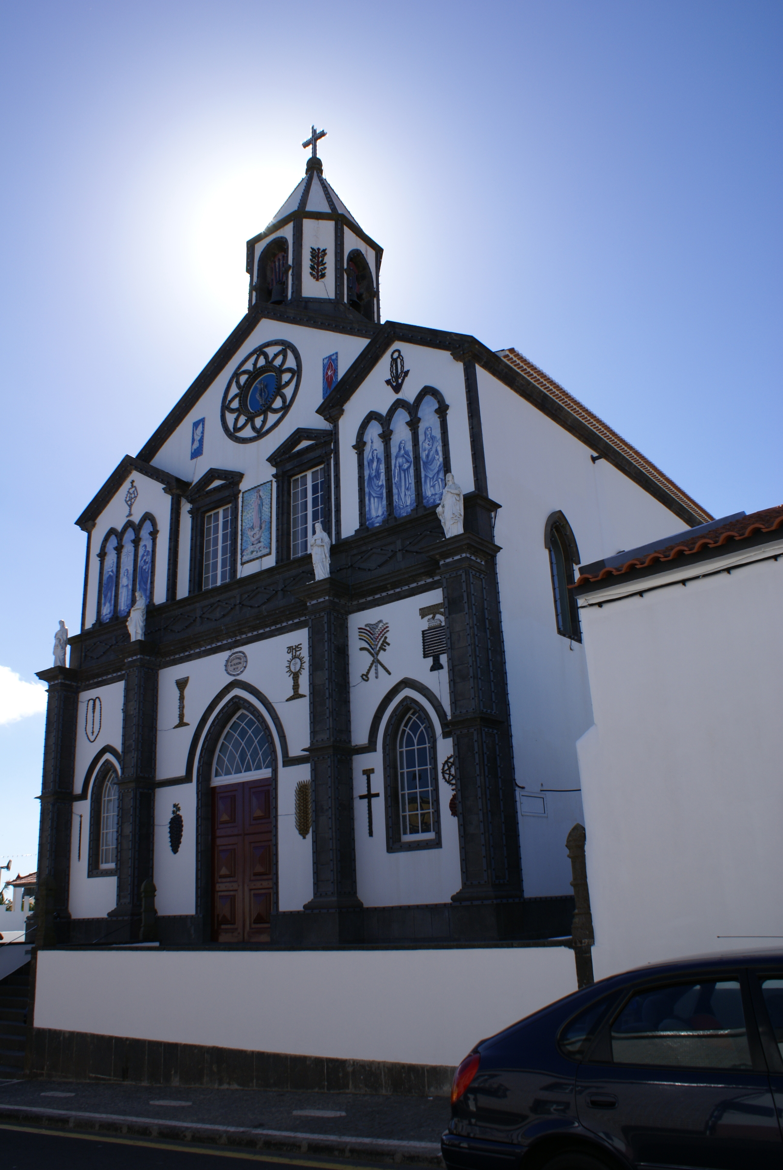 Igreja de Nossa Senhora da Oliveira, Fajã de Cima, Ponta Delgada, ilha de São Miguel, Açores